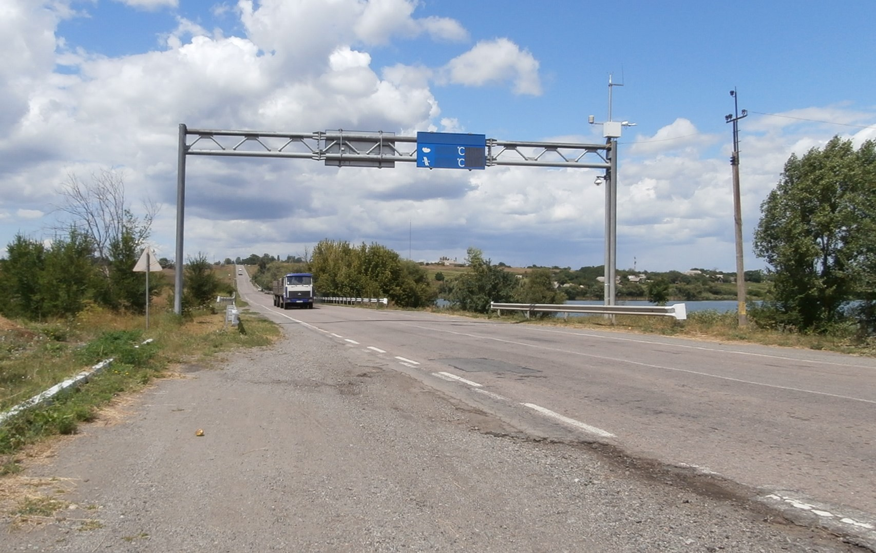 Fernstraße M04 bei Schowte (Rajon Pjatychatky), Oblast Dnipropetrowsk, Ukraine